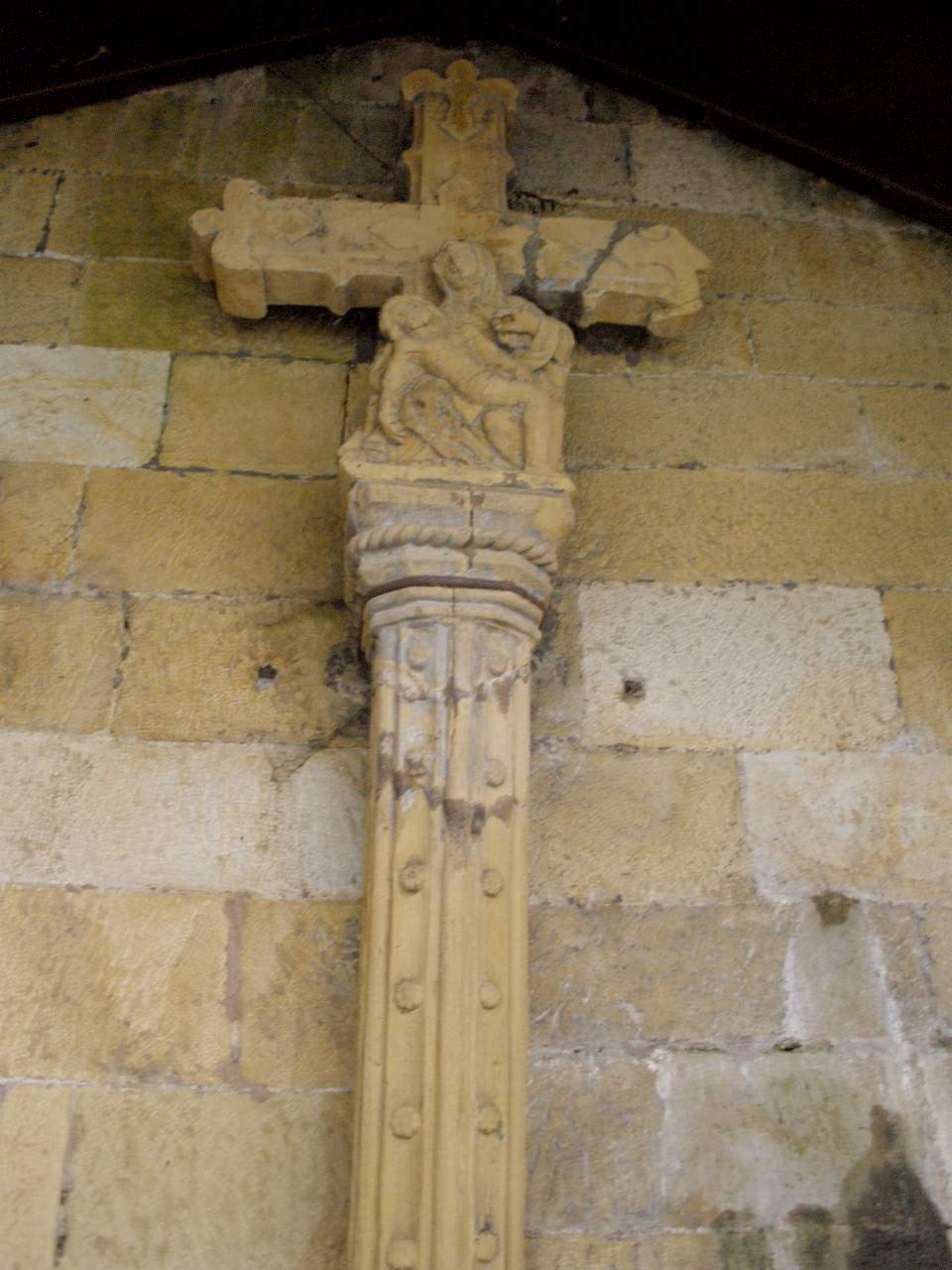 Pasajes de San Juan (Gipuzkoa)